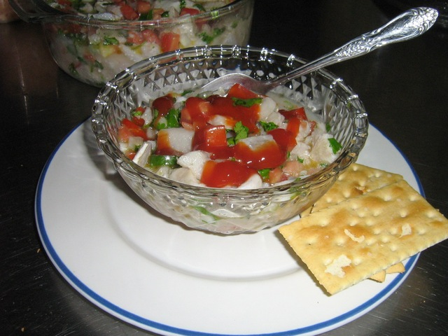 Detalle del ceviche de pescado ecuatoriano.